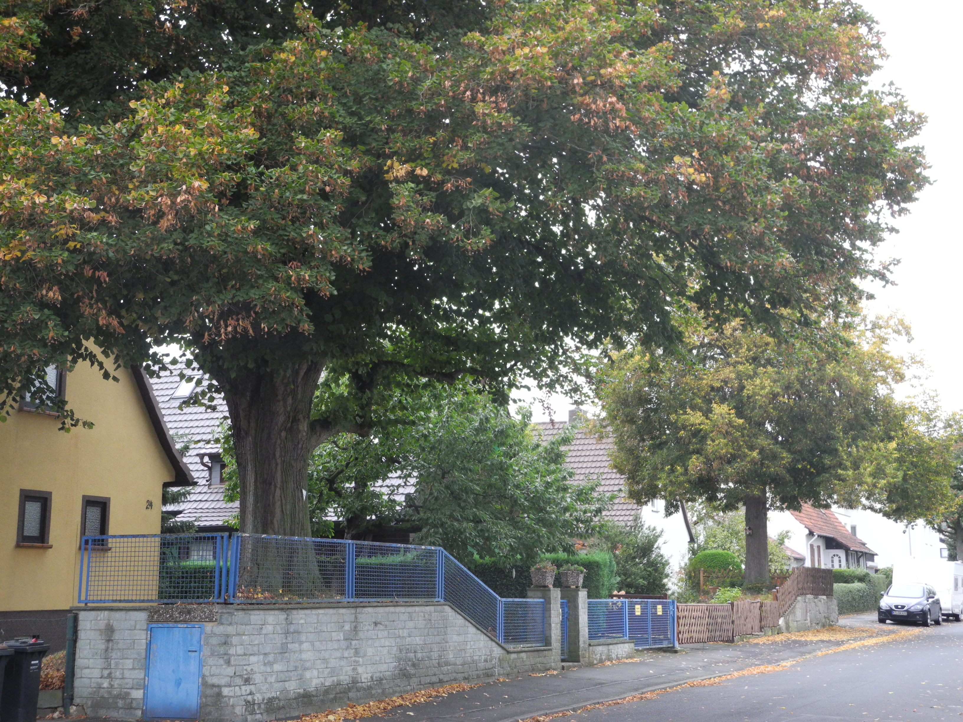 Naturdenkmal in Kassel 611.016. "1 Winterlinde" (Tilia cordata) - Niederfeldstraße, im Vorgarten von Haus Nr. 24, westlich der Immenhäuser Straße.